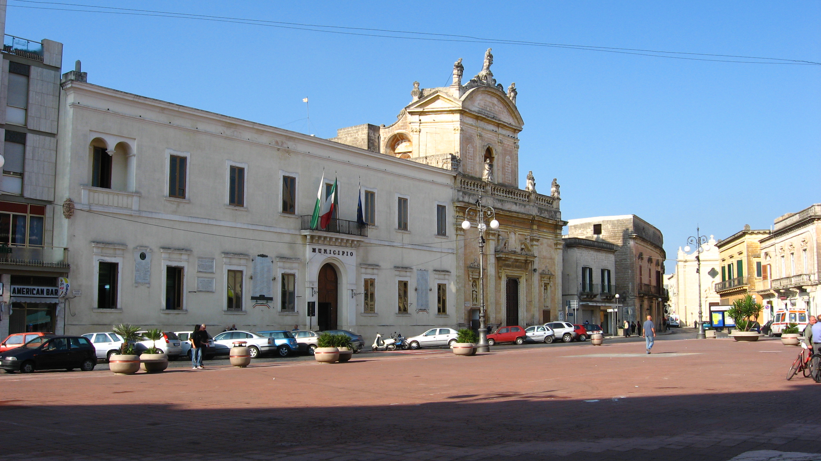 Manduria Piazza Garibaldi